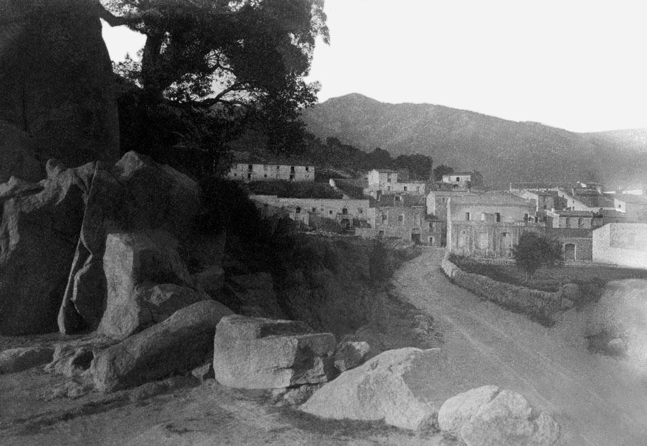 Imatge